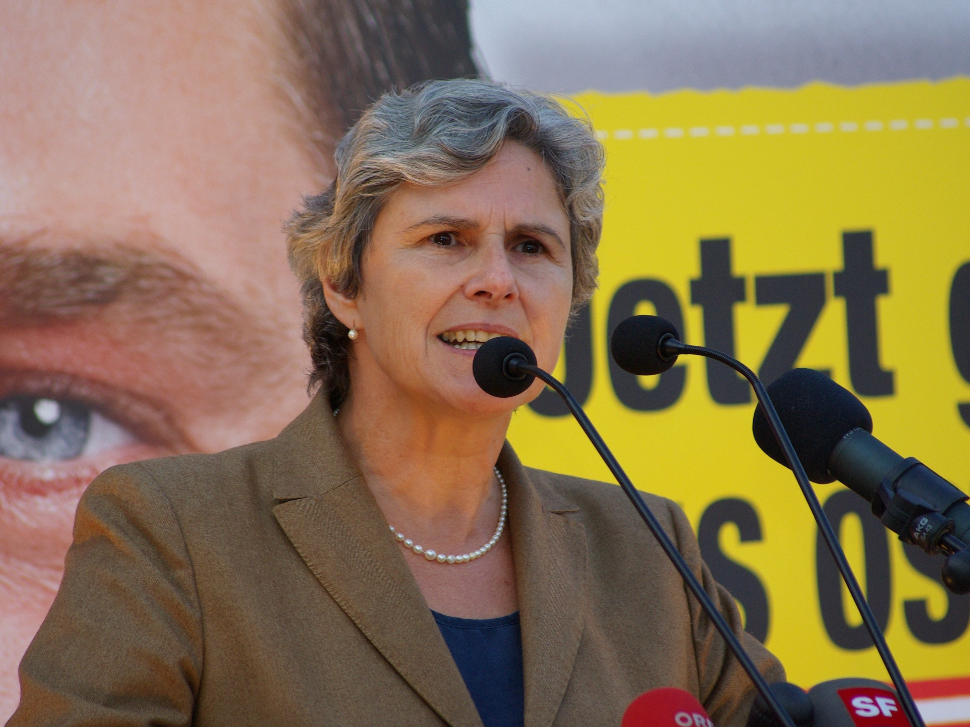 Die österreichische Politikerin Barbara Rosenkranz bei einer Wahlkampfveranstaltung der FPÖ am 18. September 2008 in Sankt Pölten.